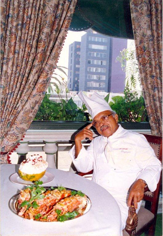 Foto tomada por Roberto Smith, hijo del famoso Chef cubano.